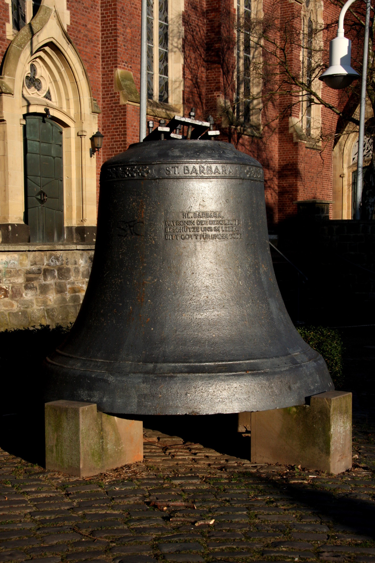 Barbaraglocke vor der Pfarrkirche St. Peter und Paul in Würselen/Bardenberg. Eisenguss, Hersteller: Ulrich und Weule, Apolda Bockenem 1923. Inschrift: Hl. Barbara, Patronin der Bergleute, Beschütze uns im Leben, Bitt Gott für uns im Tode. Gestiftet von Bardenberger Bergleuten.